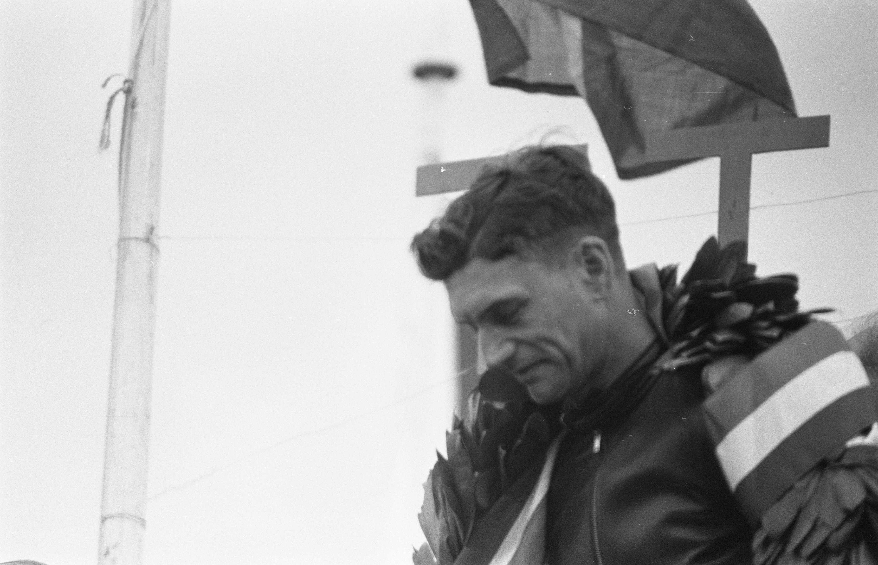 Collectie / Archief : Fotocollectie Anefo Reportage / Serie : TT Assen 1962 Beschrijving : Huldiging Jim Redman (winnaar 250cc en 350cc) Datum : 1 juli 1962 Locatie : Assen Trefwoorden : motorsport Instellingsnaam : TT Fotograaf : Bilsen, Joop van / Anefo Auteursrechthebbende : Nationaal Archief Materiaalsoort : Negatief (zwart/wit) Nummer archiefinventaris : bekijk toegang 2.24.01.05 Bestanddeelnummer : 914-0831